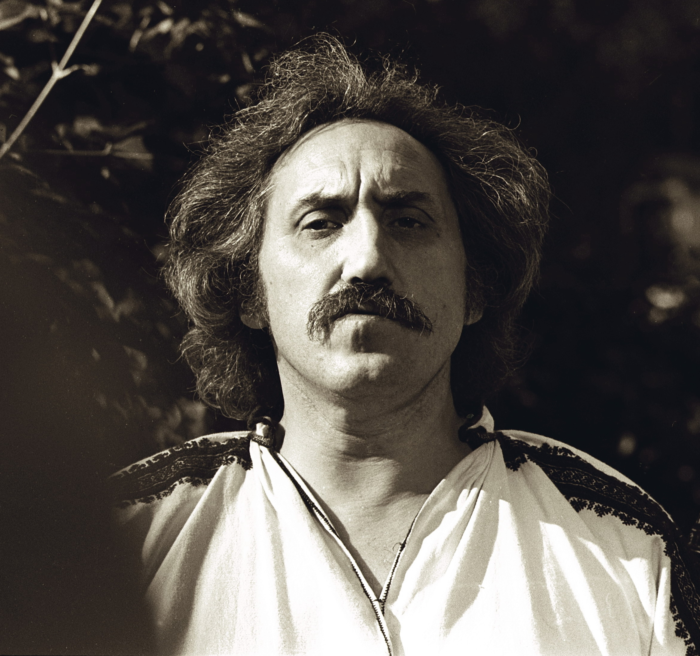 Дмитрий Покровский.